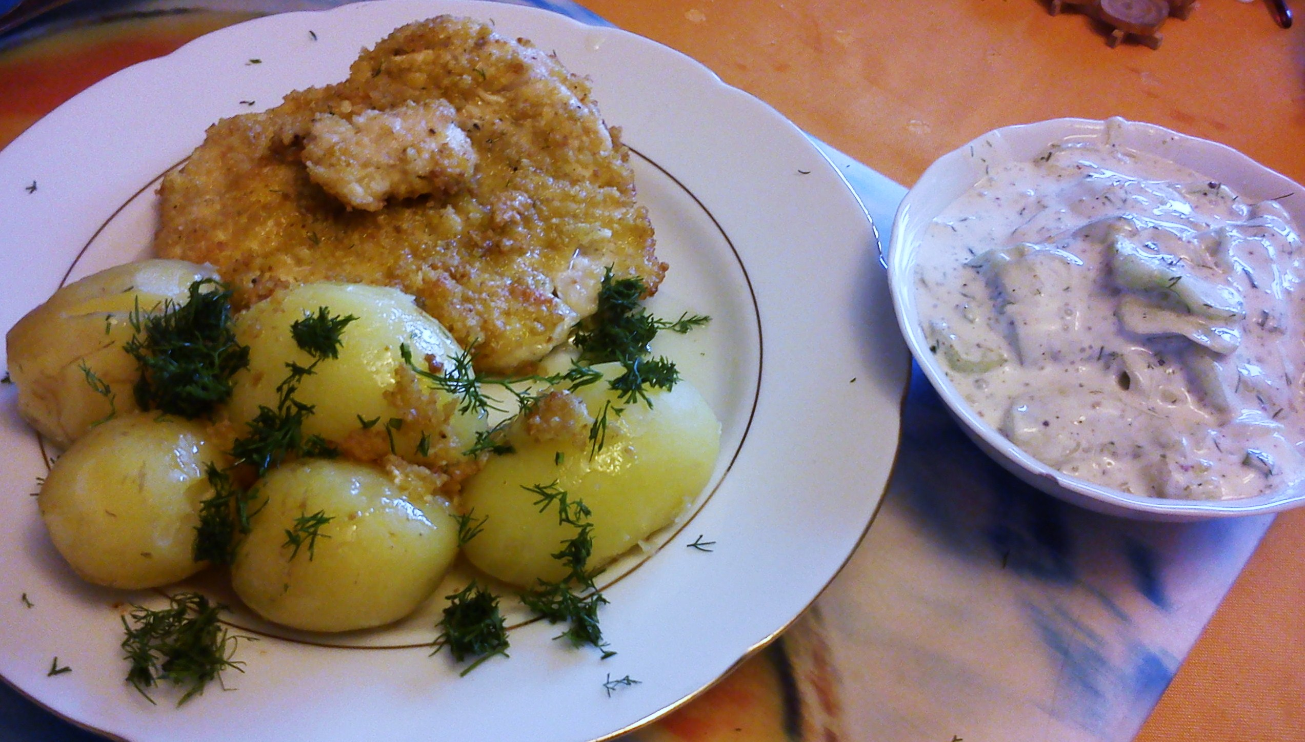 Kotlet z ziemniakami. Obok stoi mizeria.